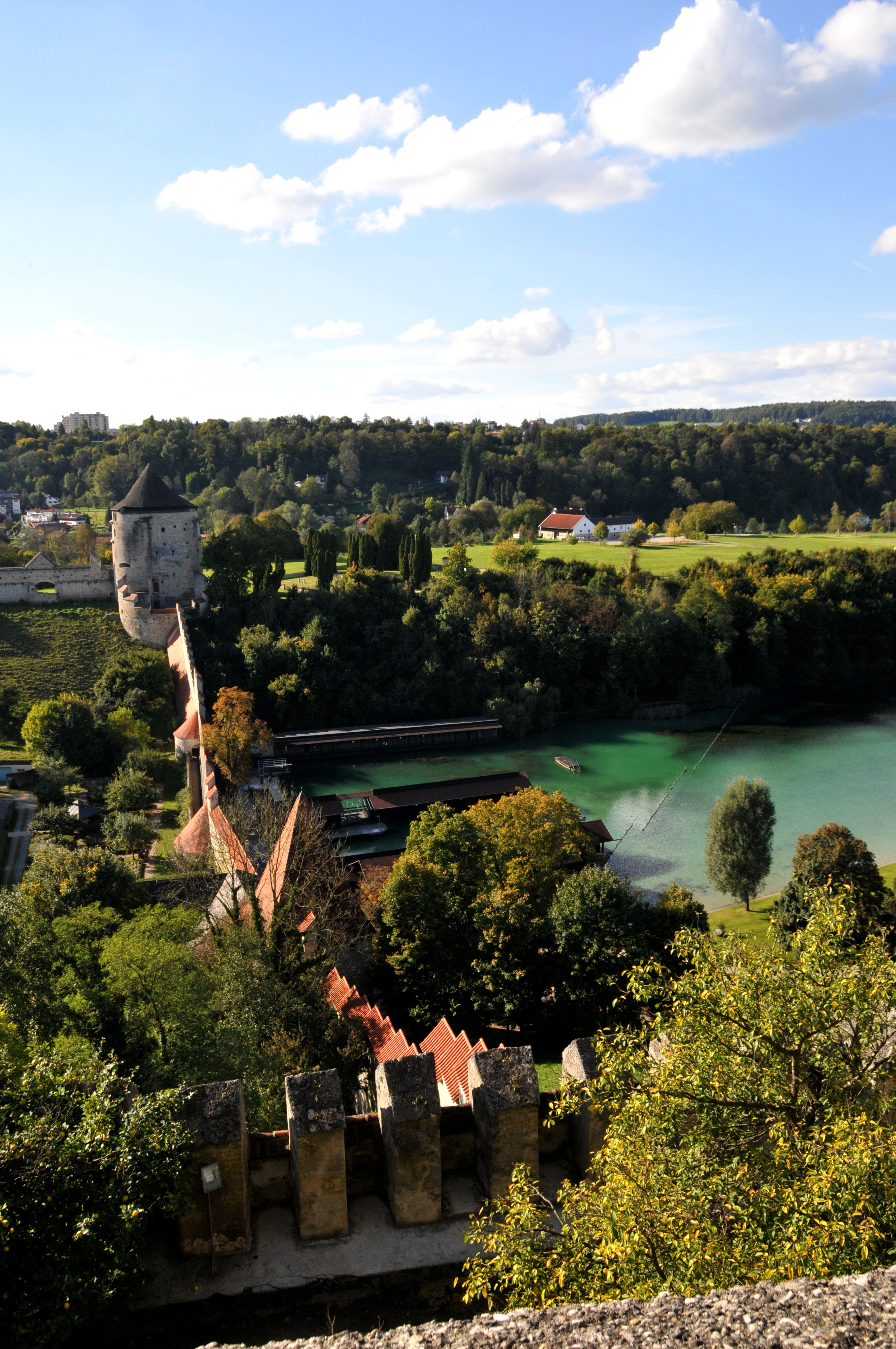 Burghausen, Wehrgang mit Pulverturm und Wöhrsee